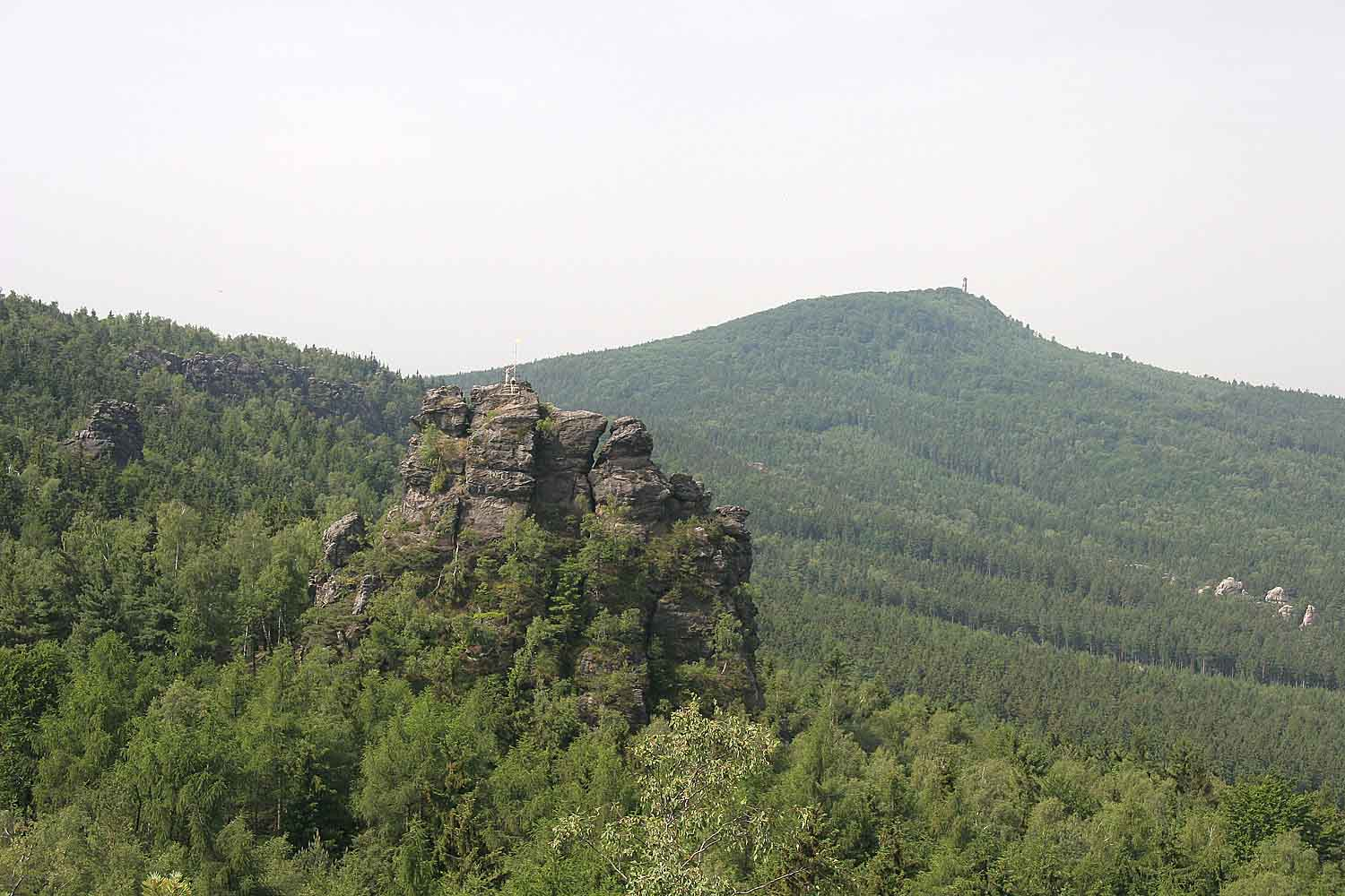 Vyhlídková skála Scharfenstein v Lužických horách z protější vyhlídky Kleine Felsengasse. V pozadí Hvozd (Hochwald).